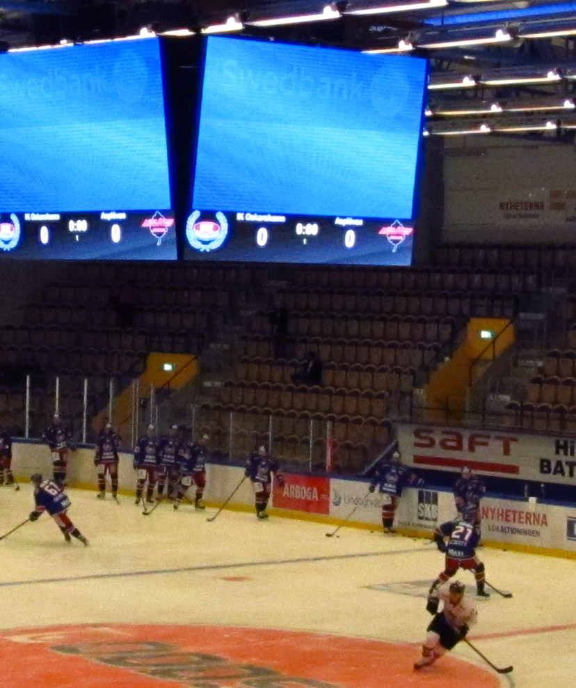 Arena Oskarshamn i september 2013 med nyinstallerad LED-skärm.